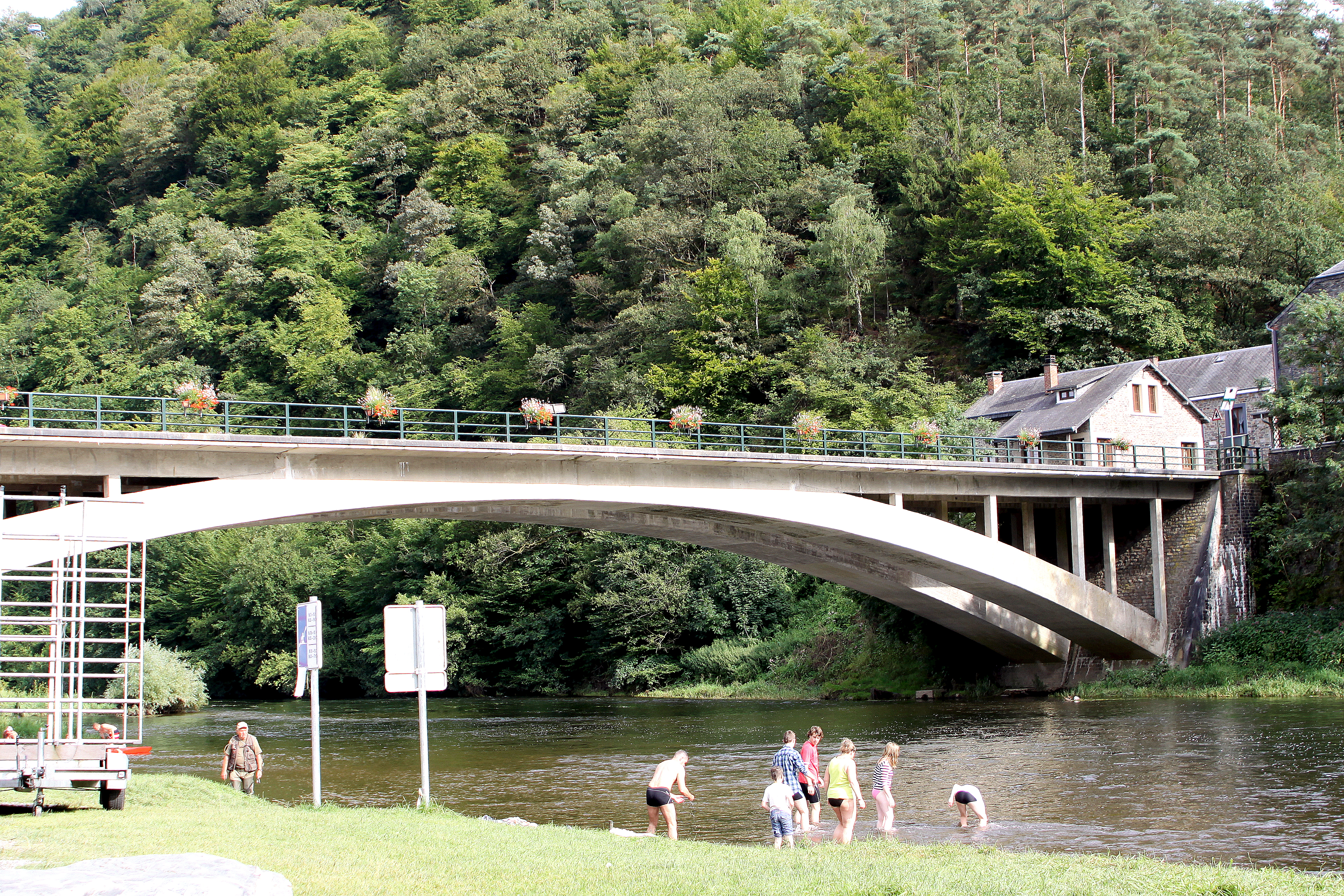 D'Bréck iwwer d'Semois zu Membre-sur-Semois